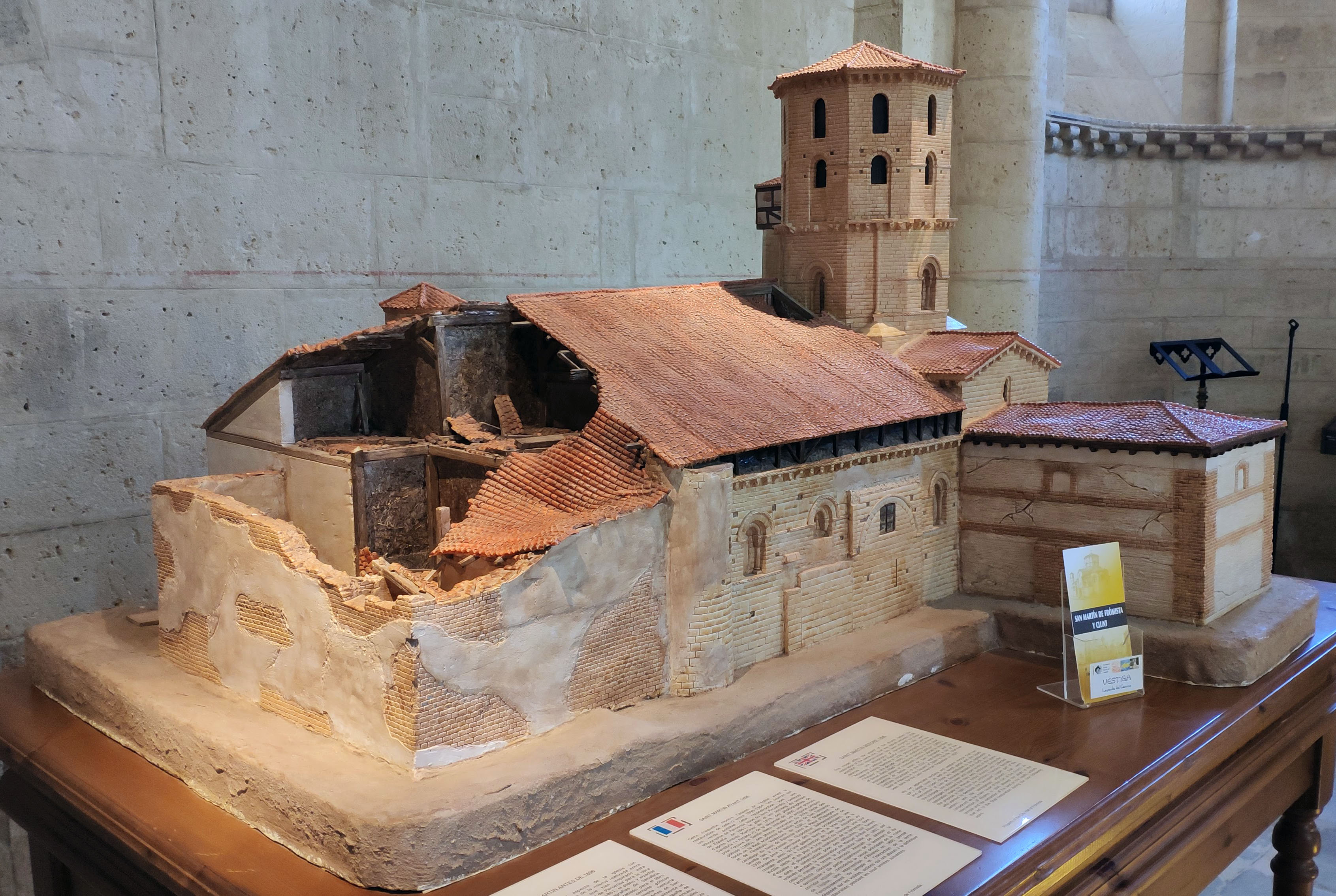 Maqueta de San Martín de Frómista antes de su restauración